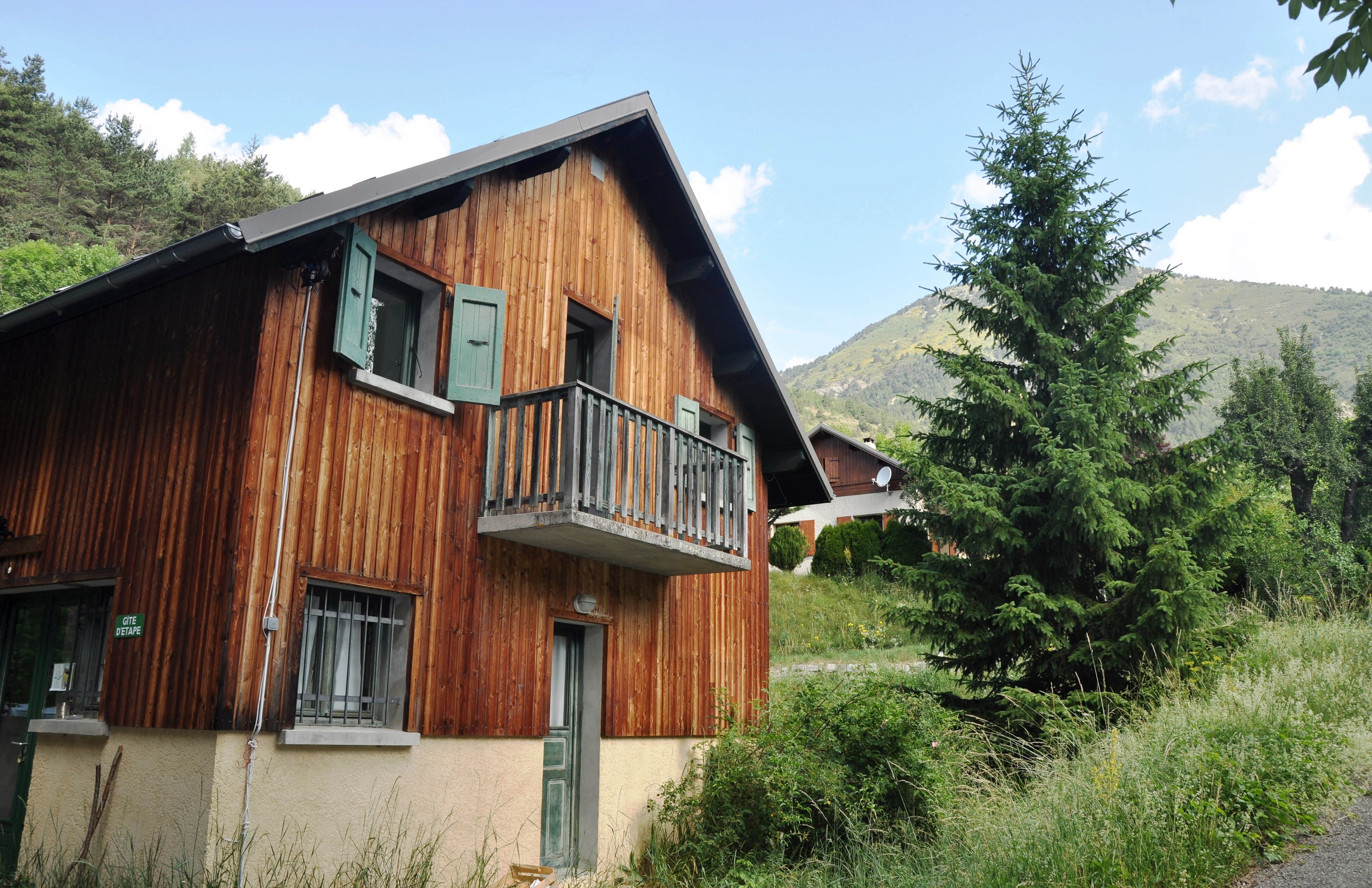 Chalet typique